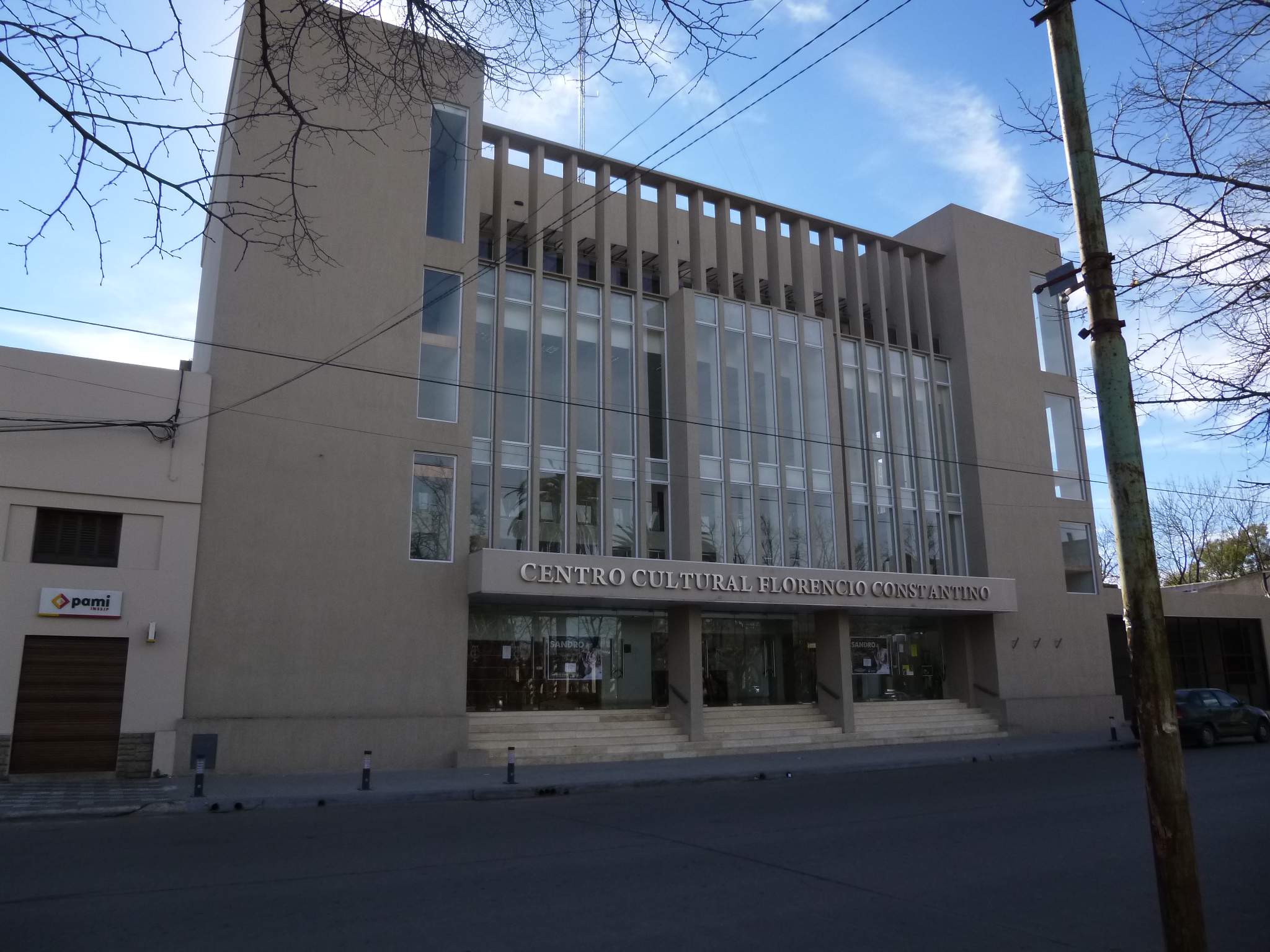 Sala del Teatro del Centro Cultural Florencio Constantino.